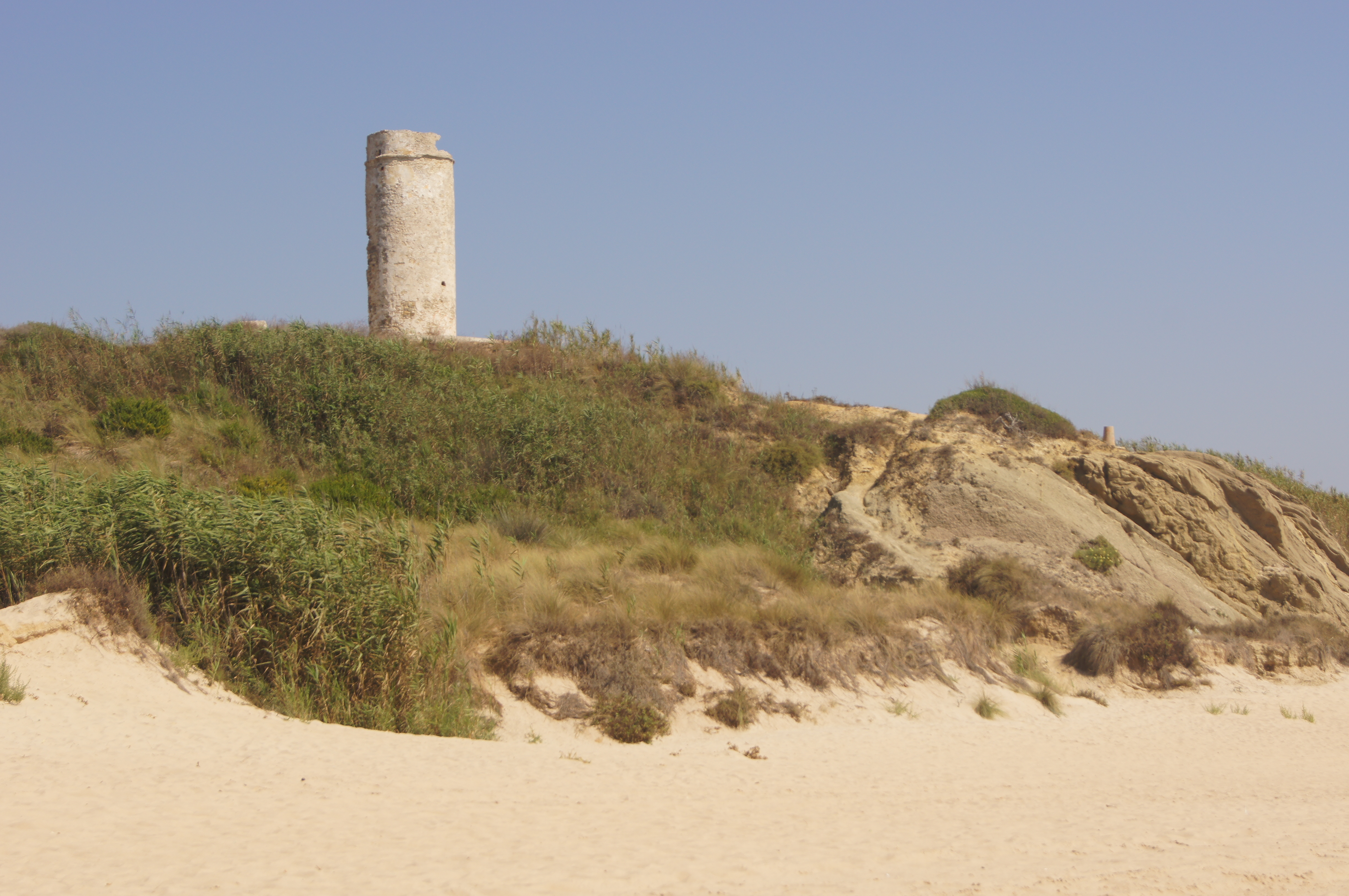 Tour de guet